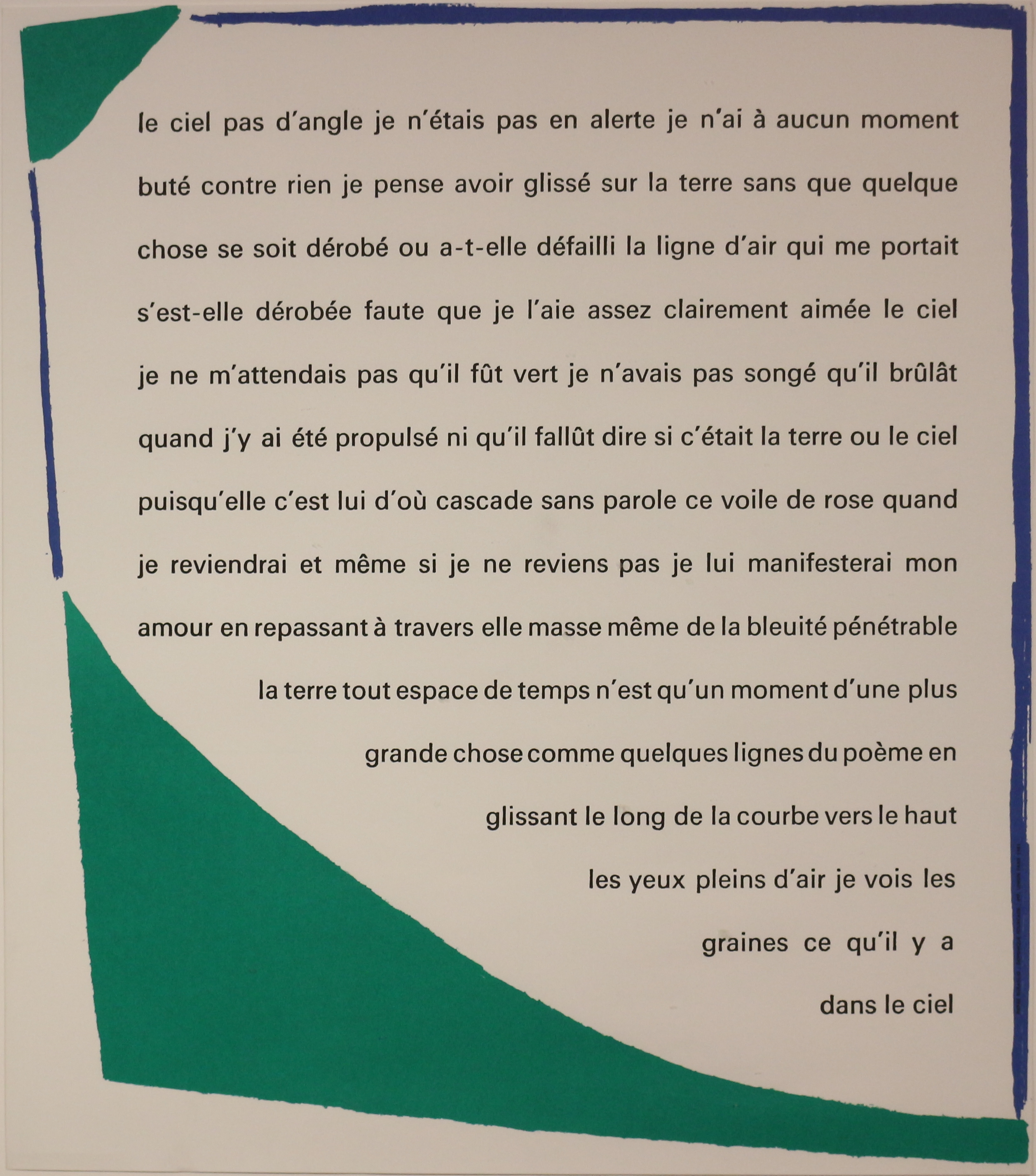 Affiche de poème